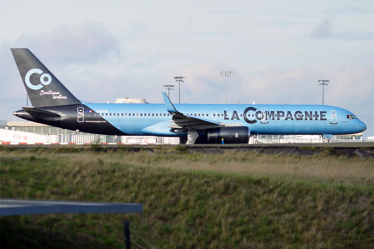 La Compagnie, F-HTAG, Boeing 757-256